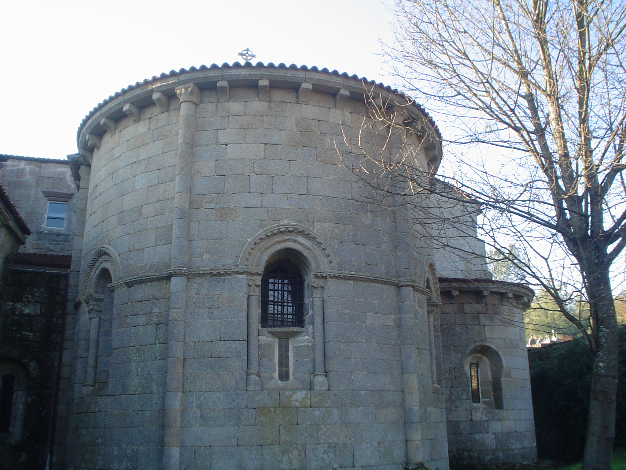 Absidas do mosteiro de San Clodio do Ribeiro (Leiro)